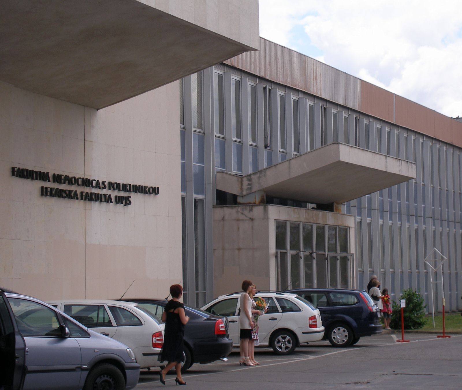 Lekárska fakulta UPJŠ v Košiciach